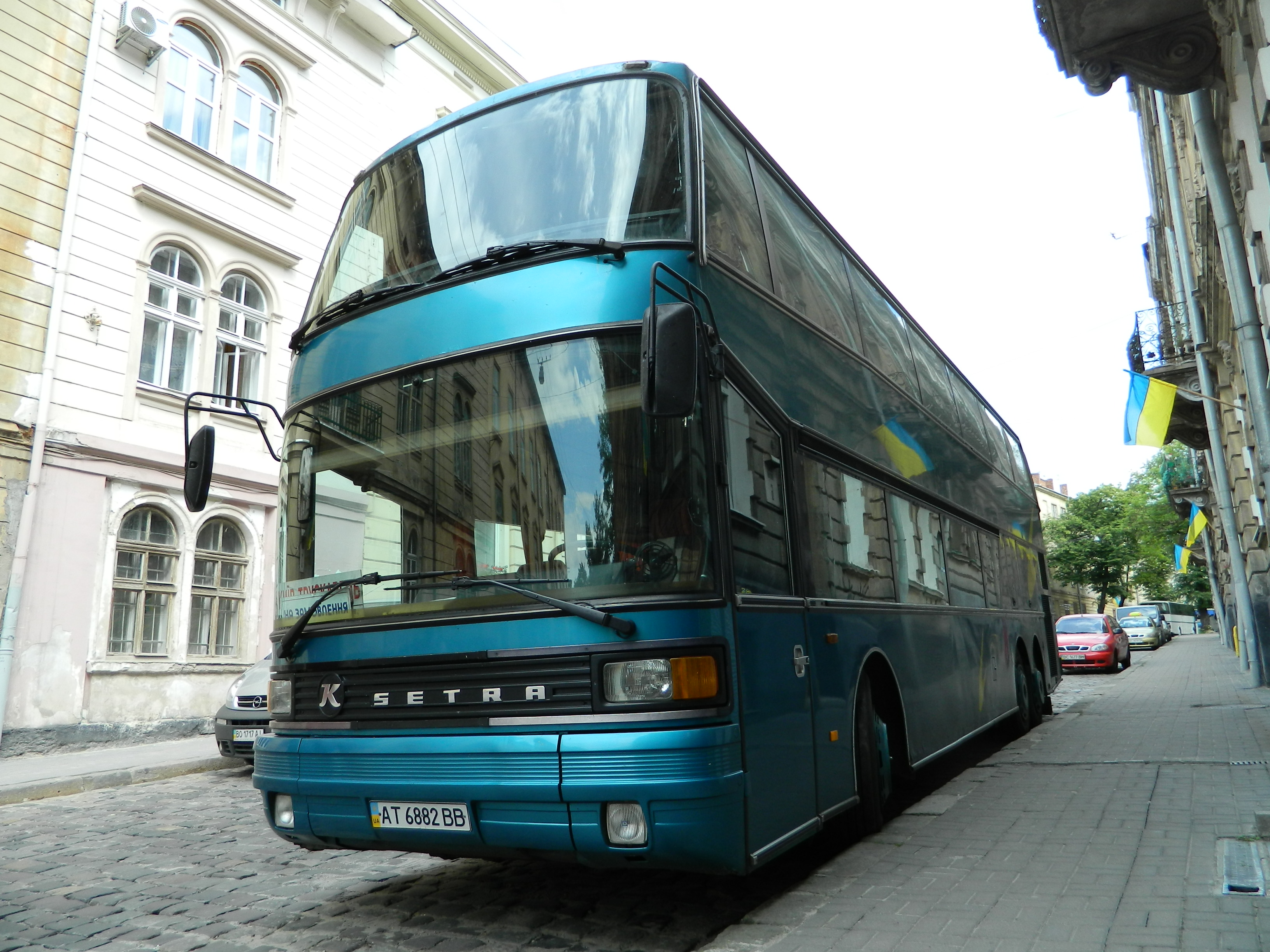 Setra S215 Doubledecker bus. Works on root Kyiv-Truskavets